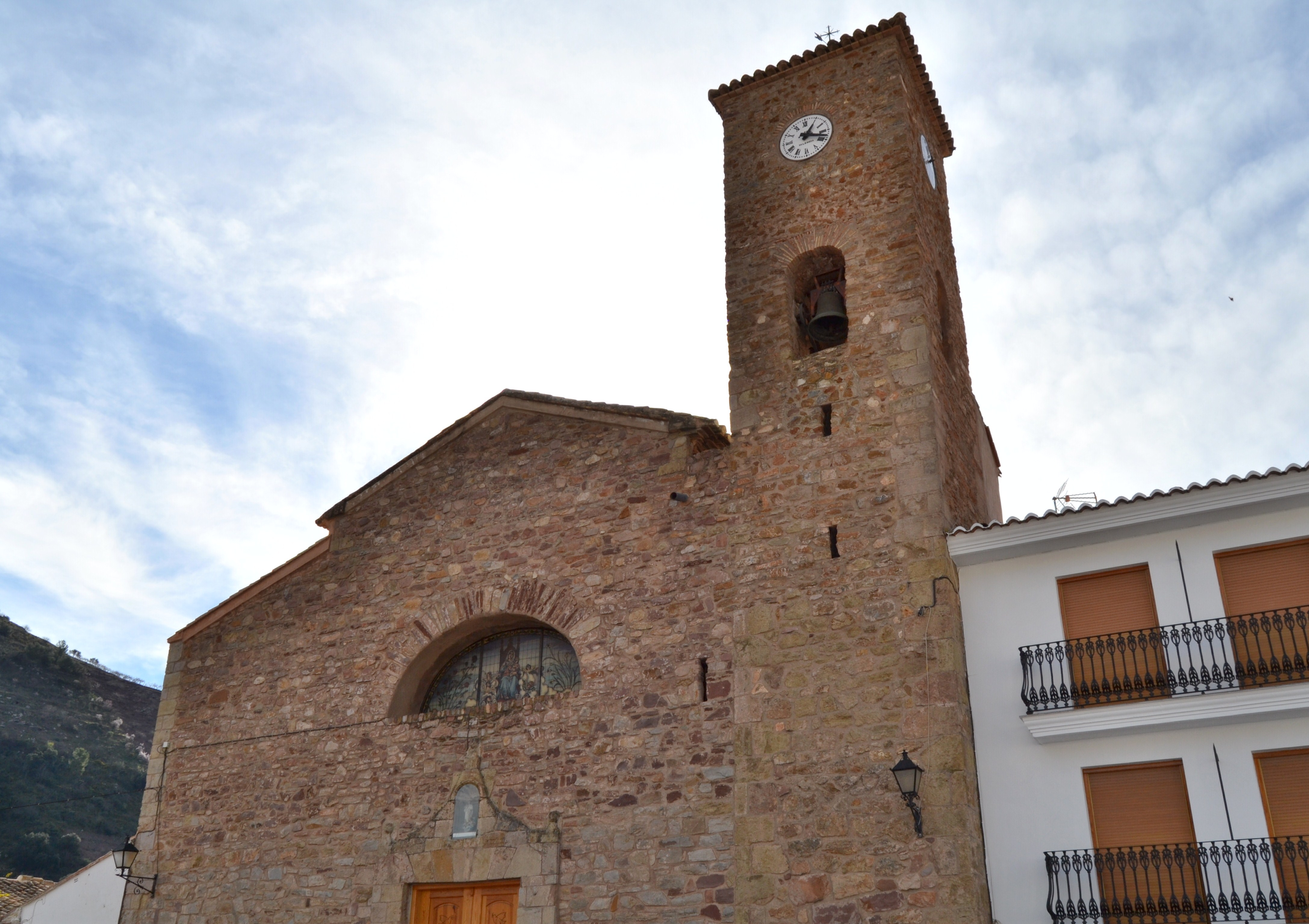 Església de la Mare de Déu dels Àngels, Almedíxer.